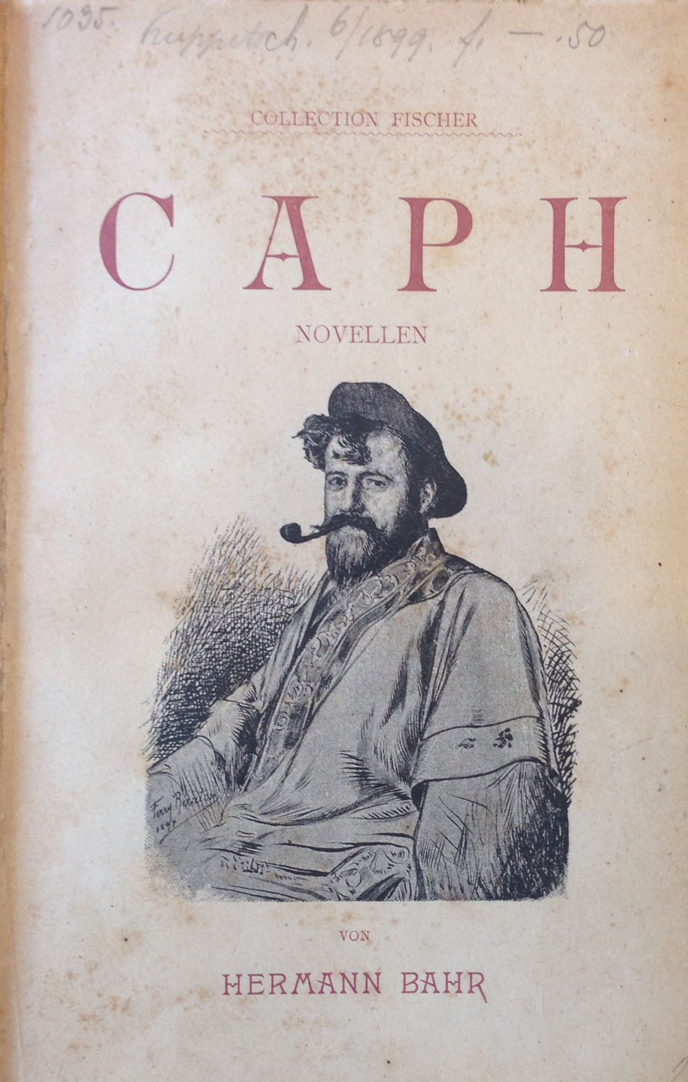 Umschlag von Hermann Bahr: Caph in der Collection Fischer, 1894